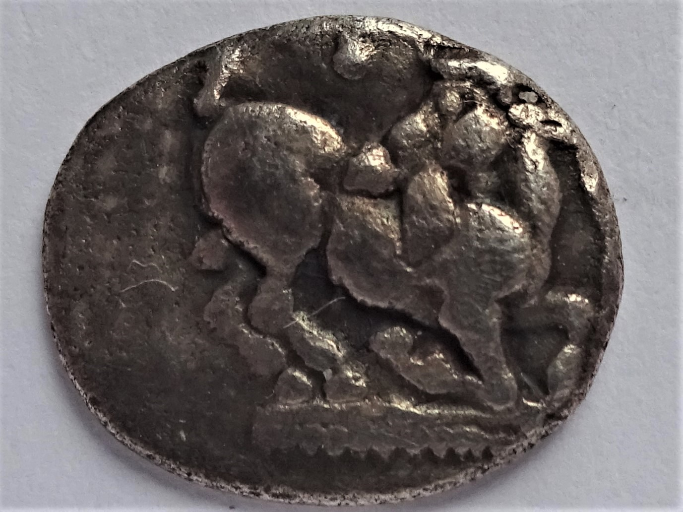 Trihemiobol aus Aegae in Makedonien, 500-480 v. Chr, Szaivert/Sear Nr. 1477, BMC 4